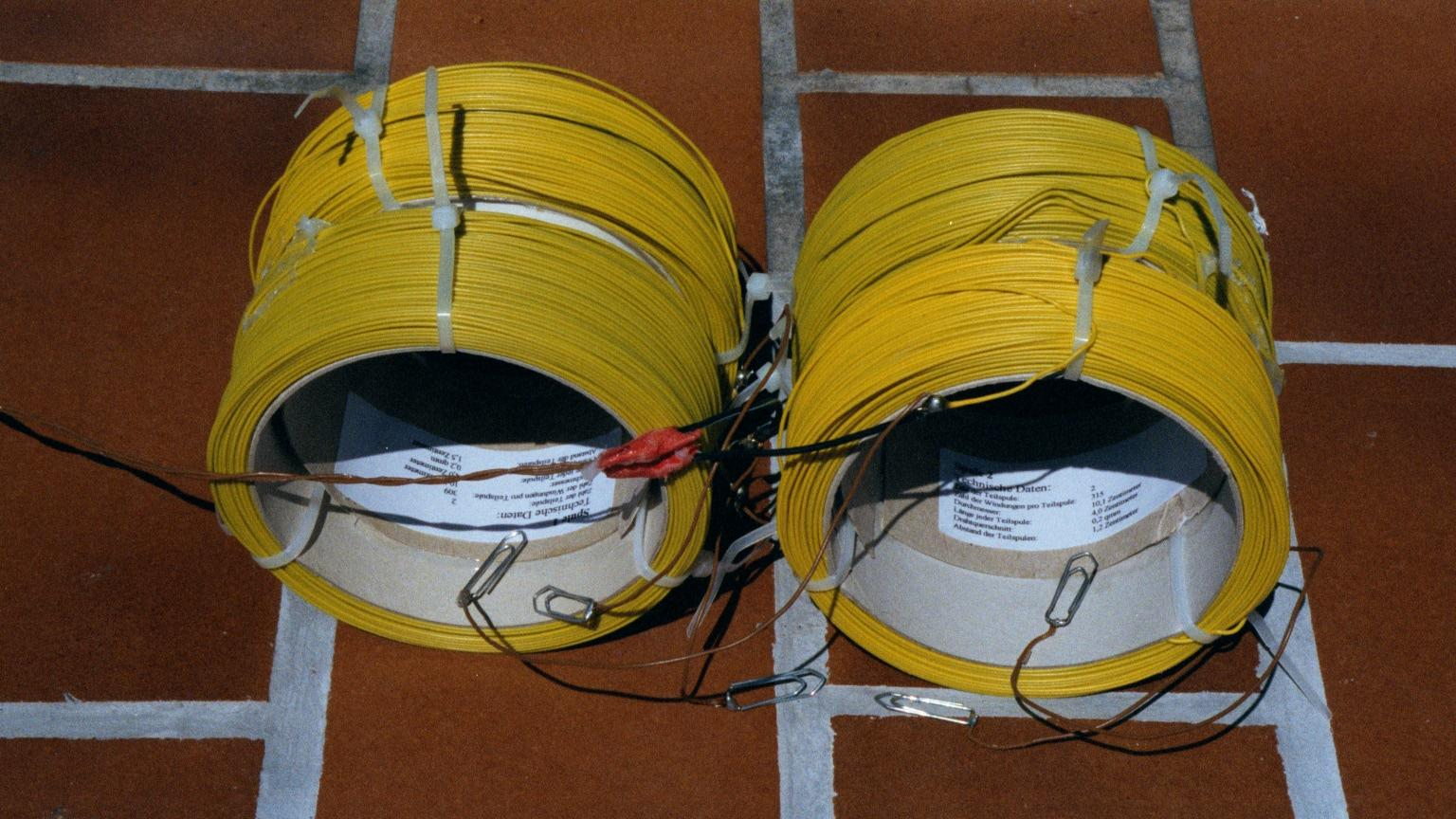 Antenne für VLF-Empfang mit dem PC